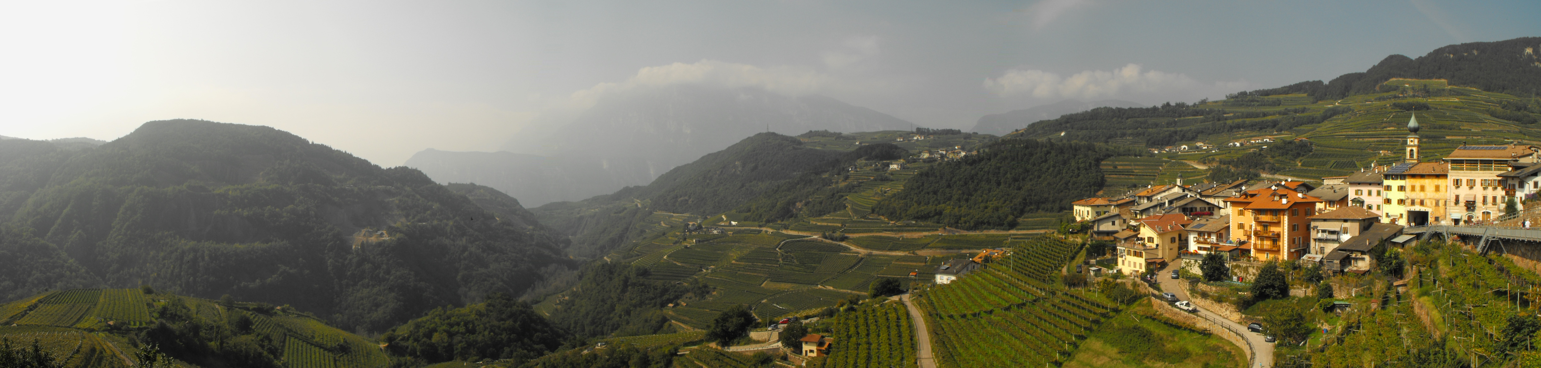 Panorama da Verla, frazione del comune di Giovo - Provincia autonoma di Trento, Trentino-Alto Adige/Südtirol